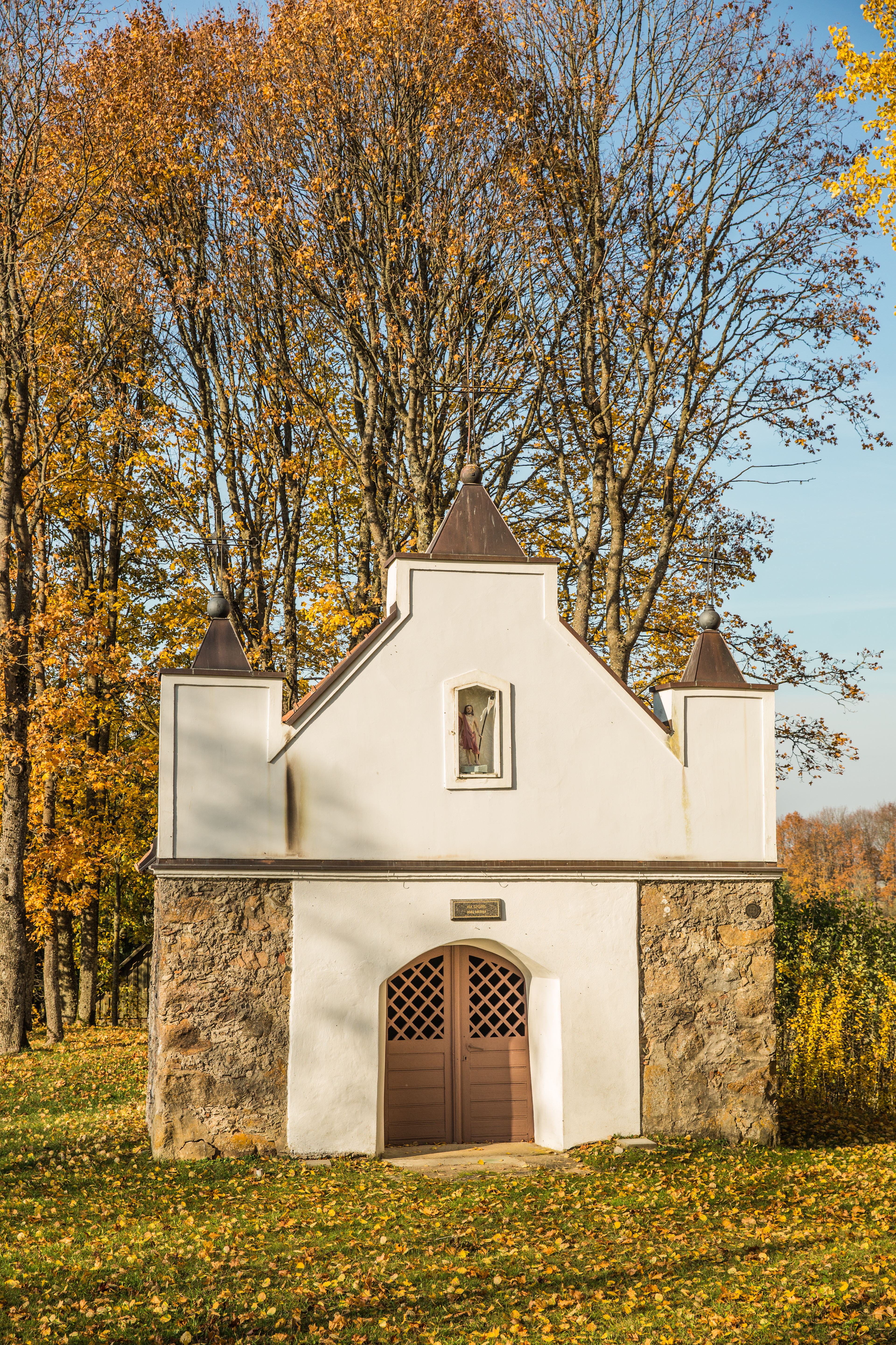 Viena ir Žemaičių Kalvarijos kryžiaus kelio koplyčių